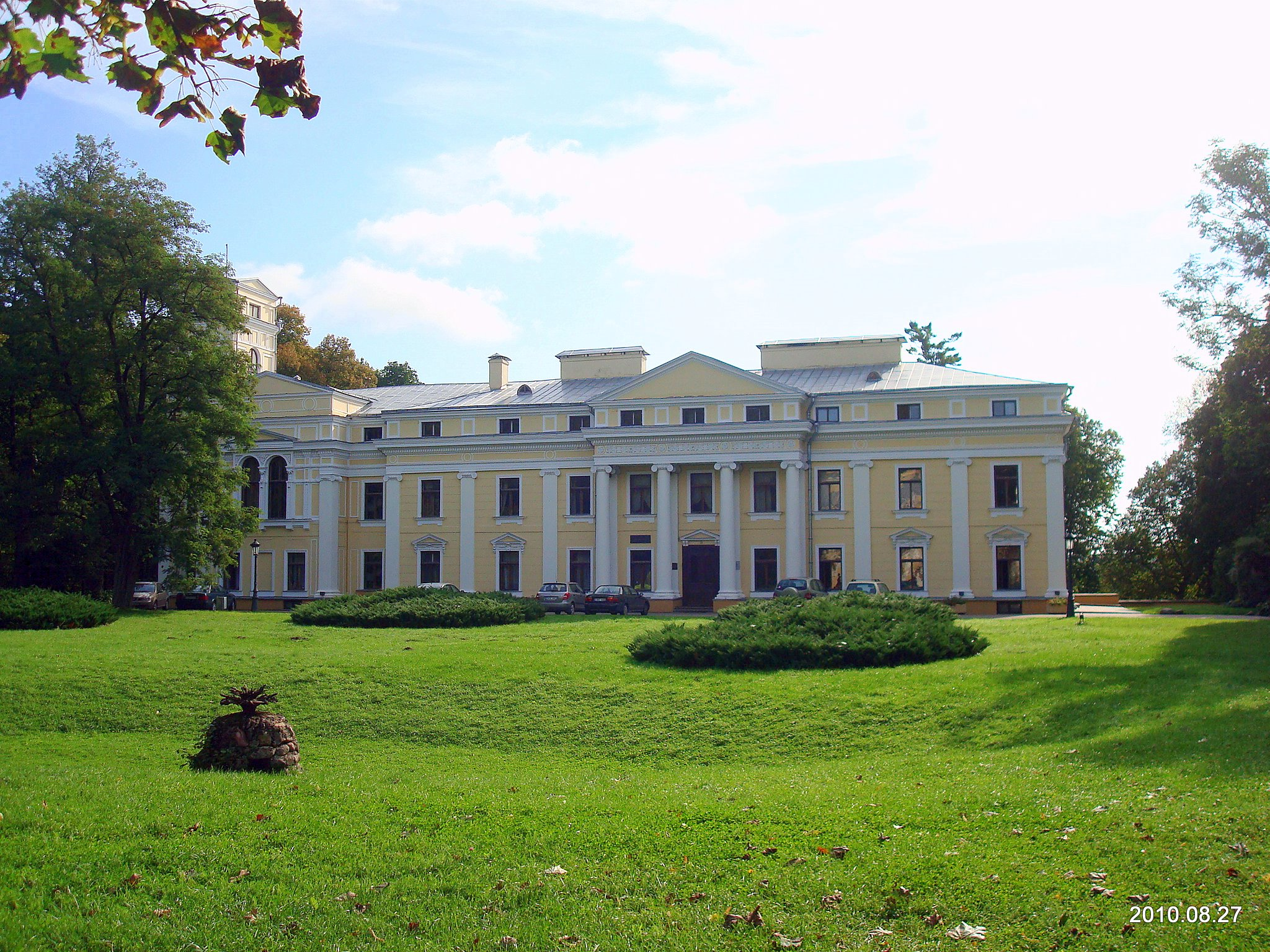 Вяркяйский дворец